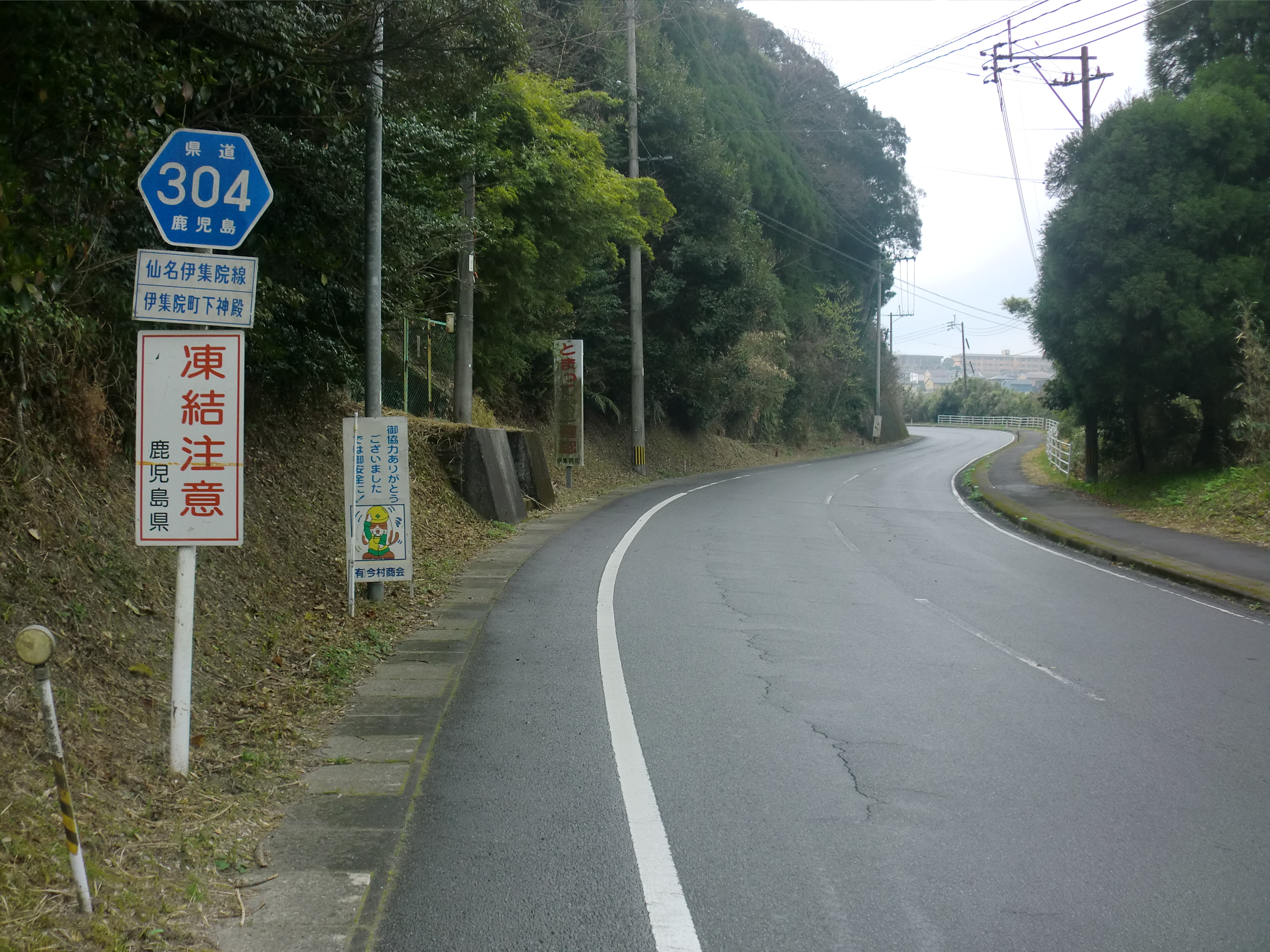 鹿児島県道304号仙名伊集院線。日置市で撮影。